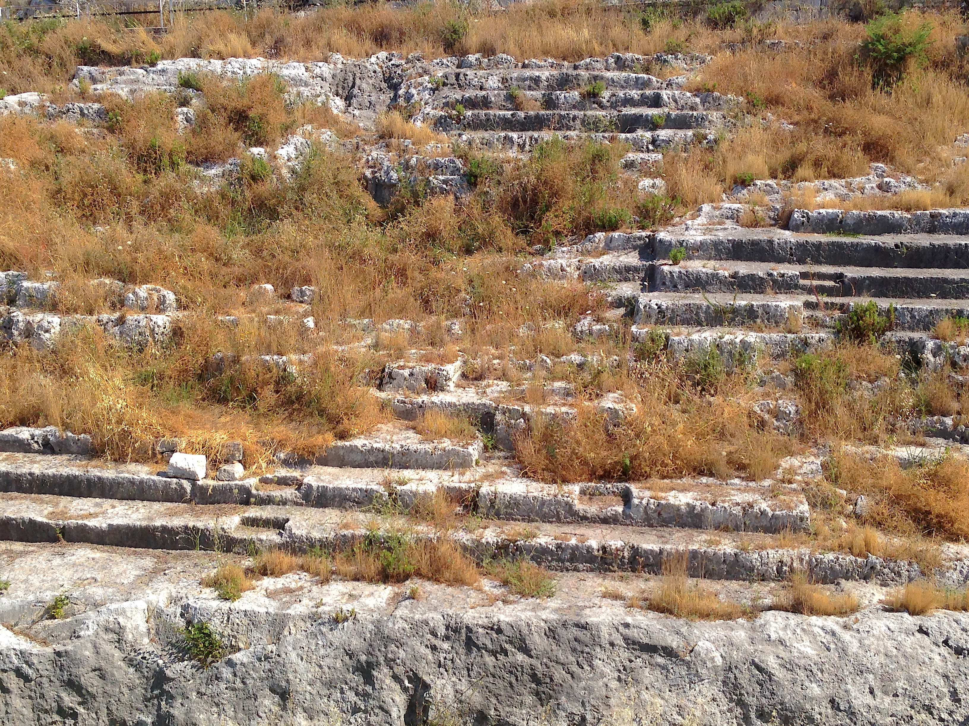 Teatro arcaico di Siracusa